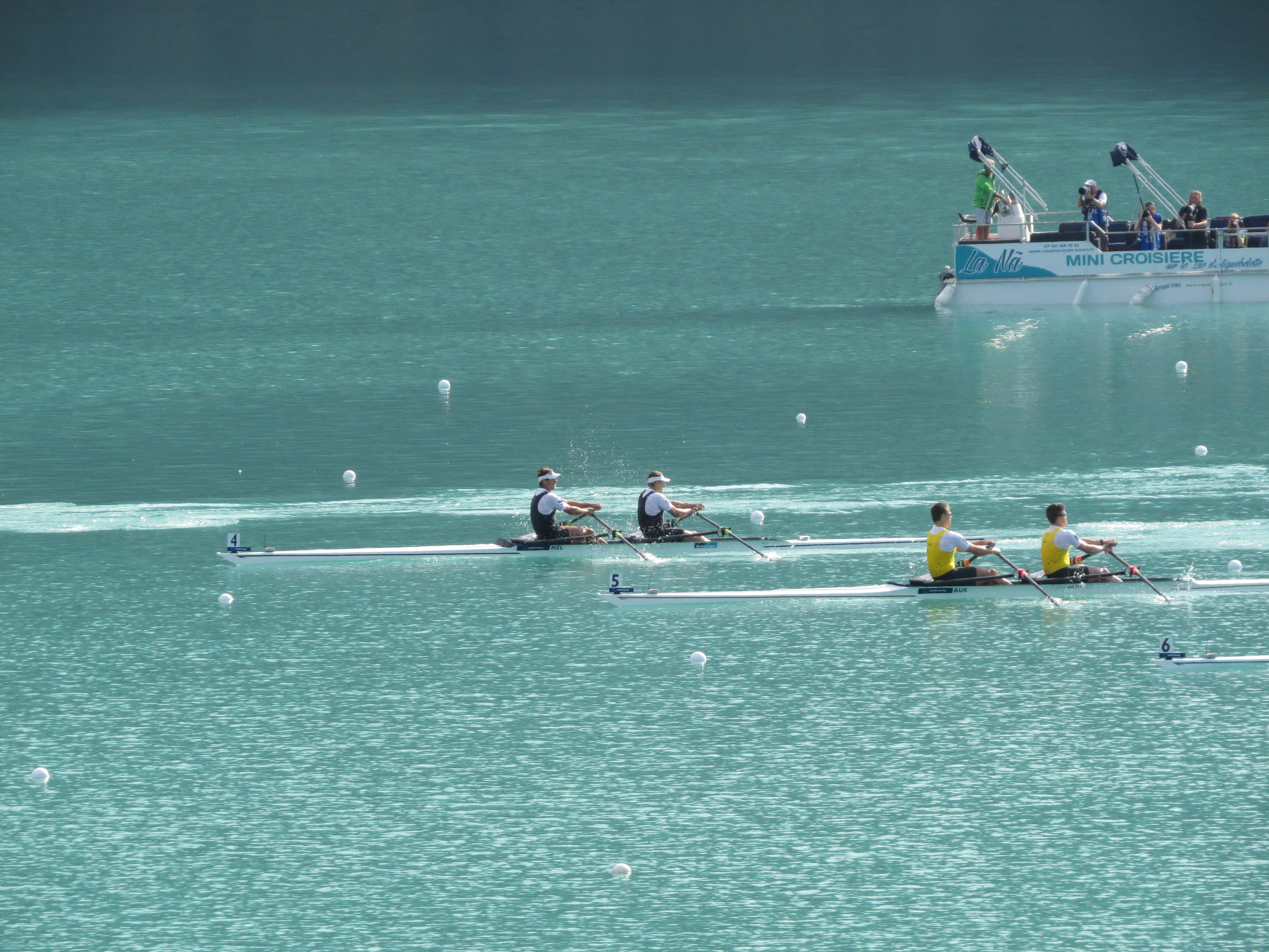 Bateaux en demi-finale du M2x AUS : MCRAE, James et BELONOGOFF, Alexander NZL : MANSON, Robert et HARRIS, Christopher